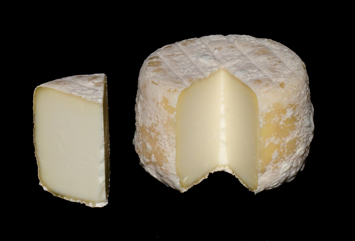 French cheese : Crottin de Chavignol